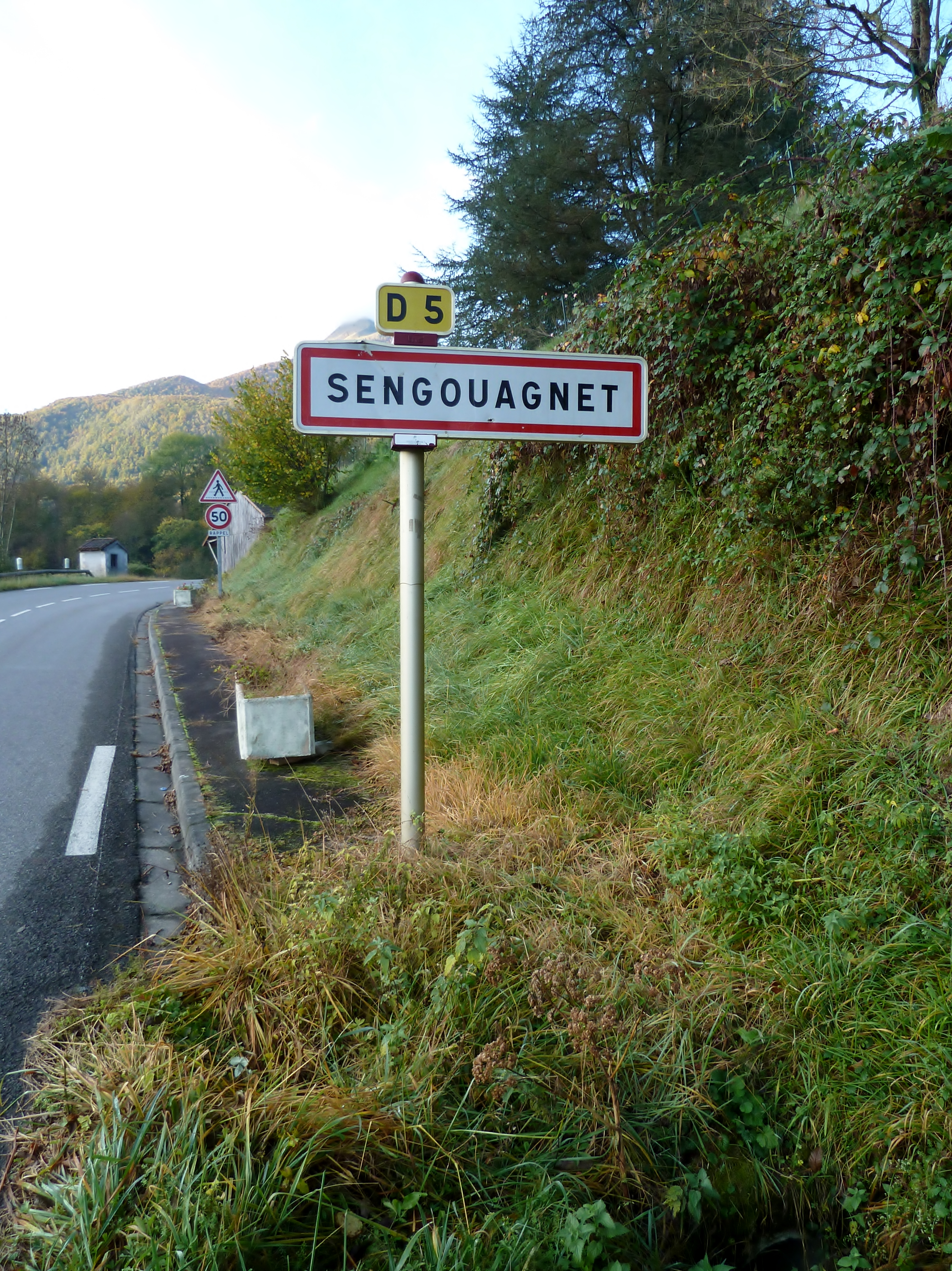 Entrée dans Sengouagnet